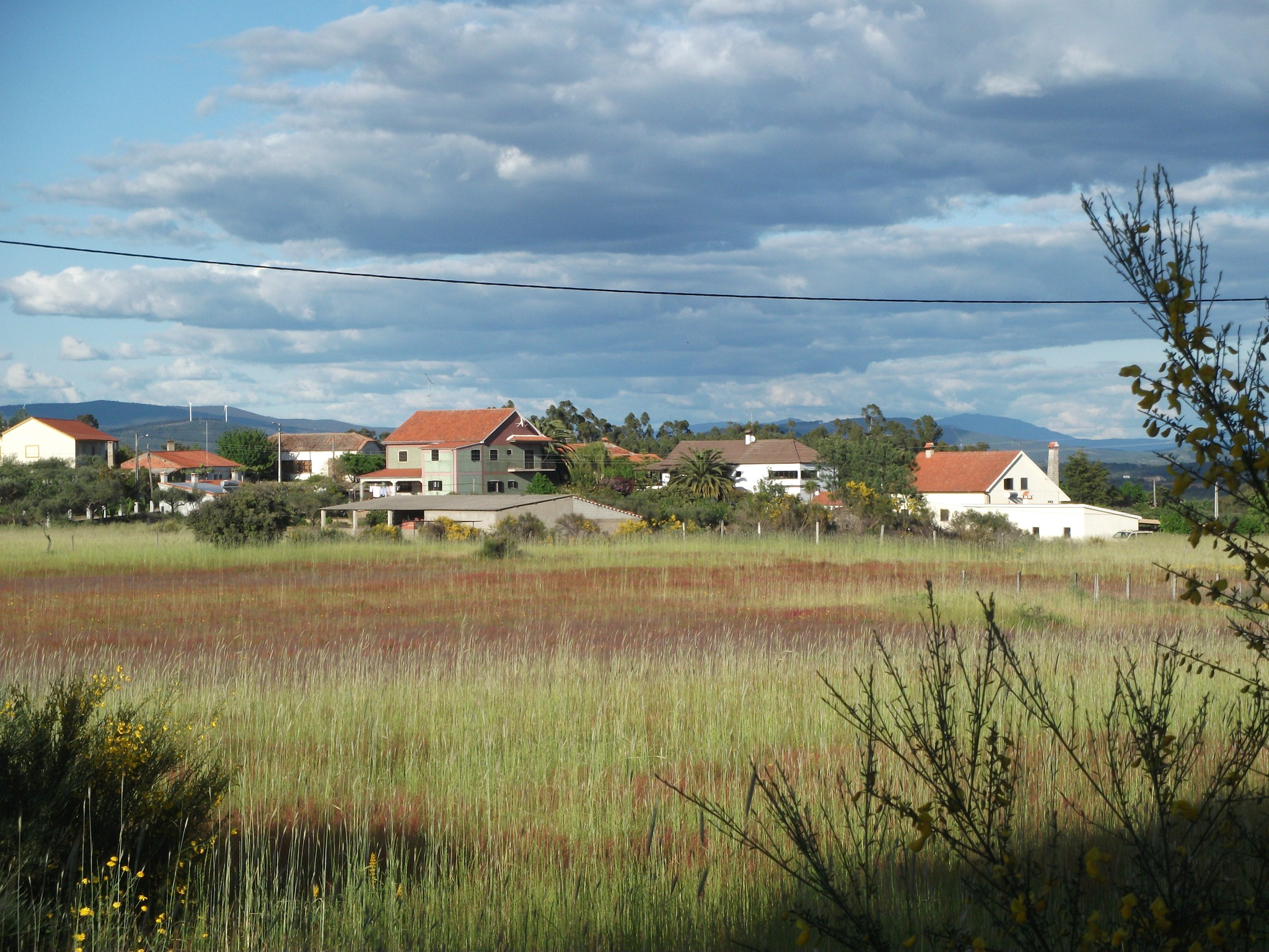 Torre dos Namorados, ou Quintas da Torre (parte centro)